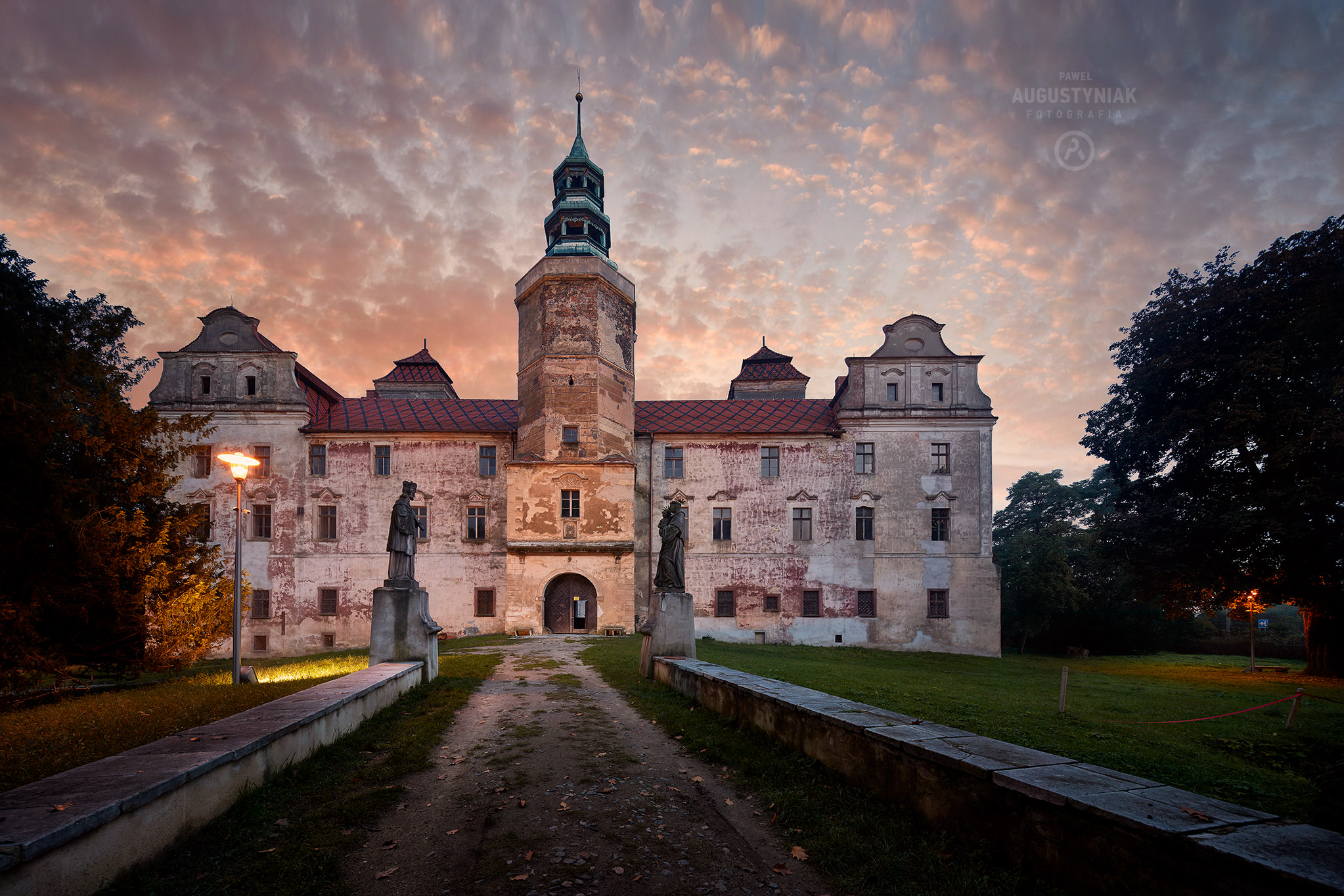 Zamek Niemodlin stan na 2017